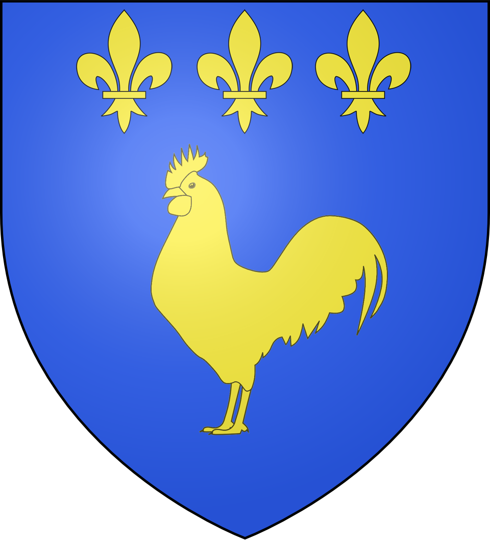 Blason de la ville de Gaillac (Tarn) : D'azur au coq d'or surmonté de trois fleurs de lys du même rangées en chef